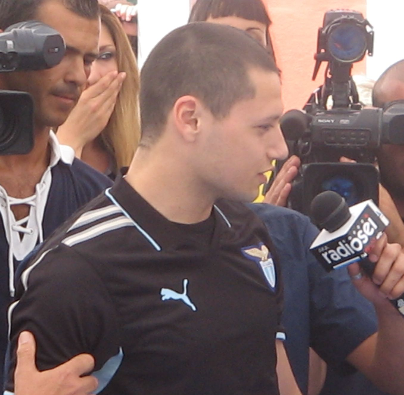 Mauro Zàrate alla presentazione delle maglie della Lazio 2008/2009